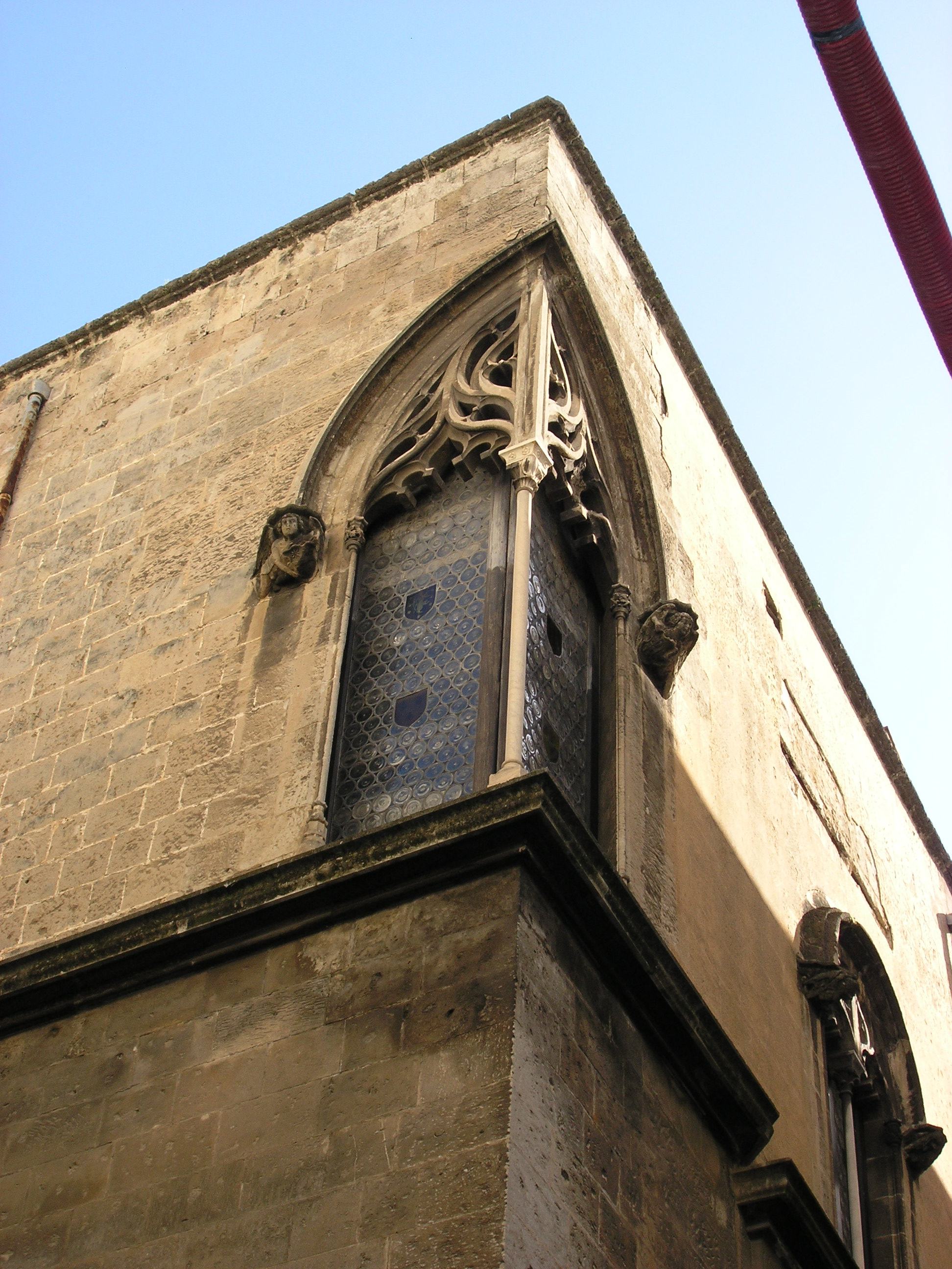 Sicilianu: Palazzu Alliata di Pietratagliata ex Termini - finestra (dittagghiu)